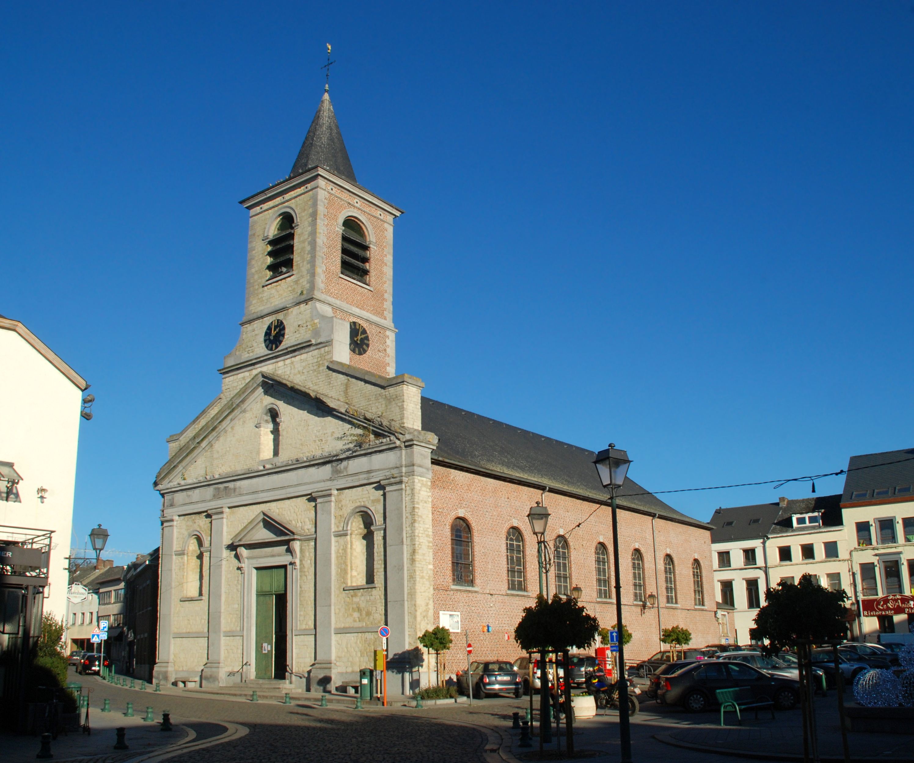 Belgique - Wallonie - Église Saint-Jean l'Évangéliste de Genappe